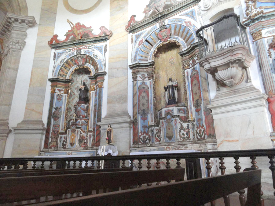 Igreja de Nossa Senhora do Rosário dos Homens Pretos em Ouro Preto